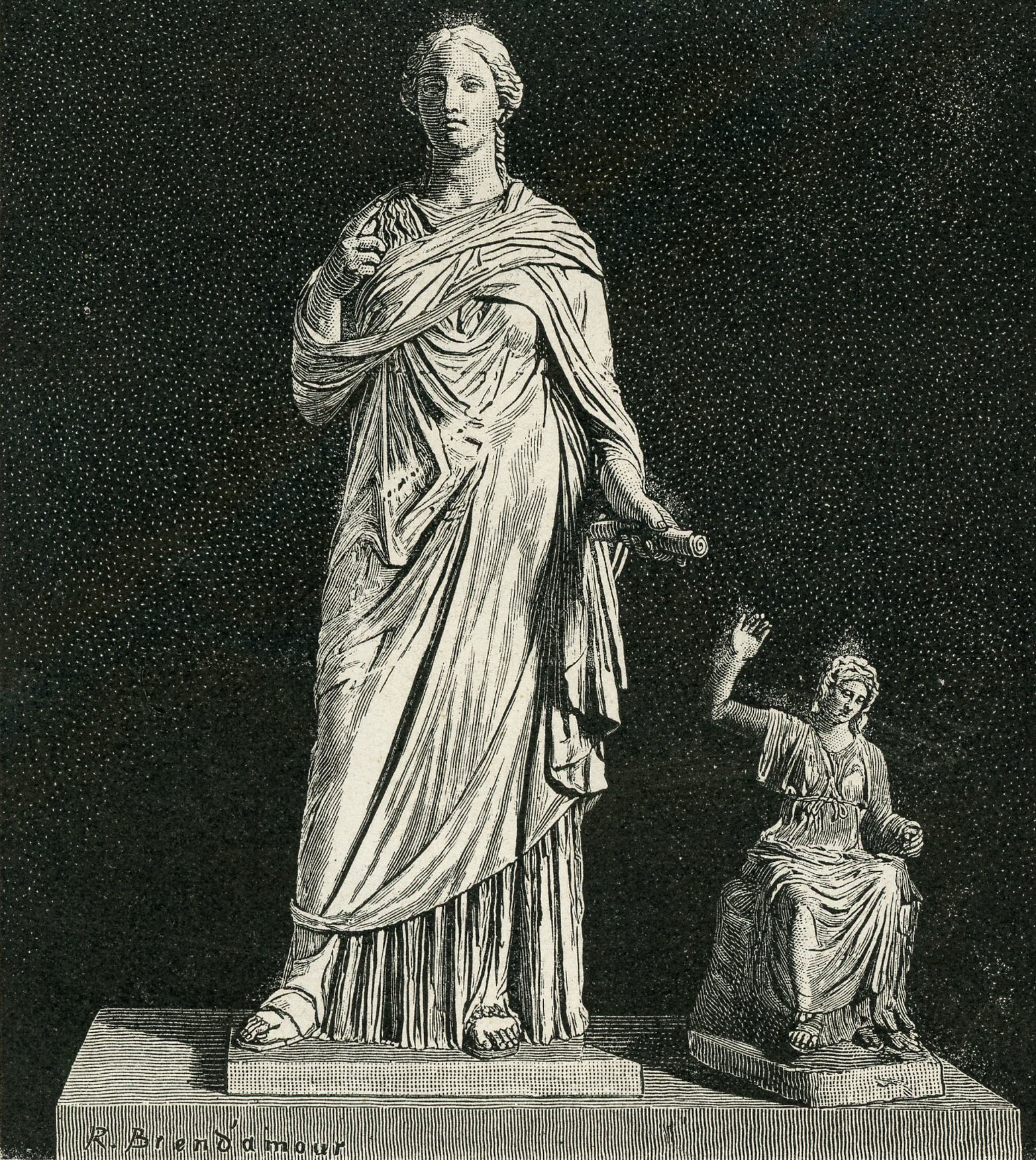 Napoli (Museo Nazionale): Calliope, Musa della Poesia Eroica (xilografia di Richard Brend'amour).